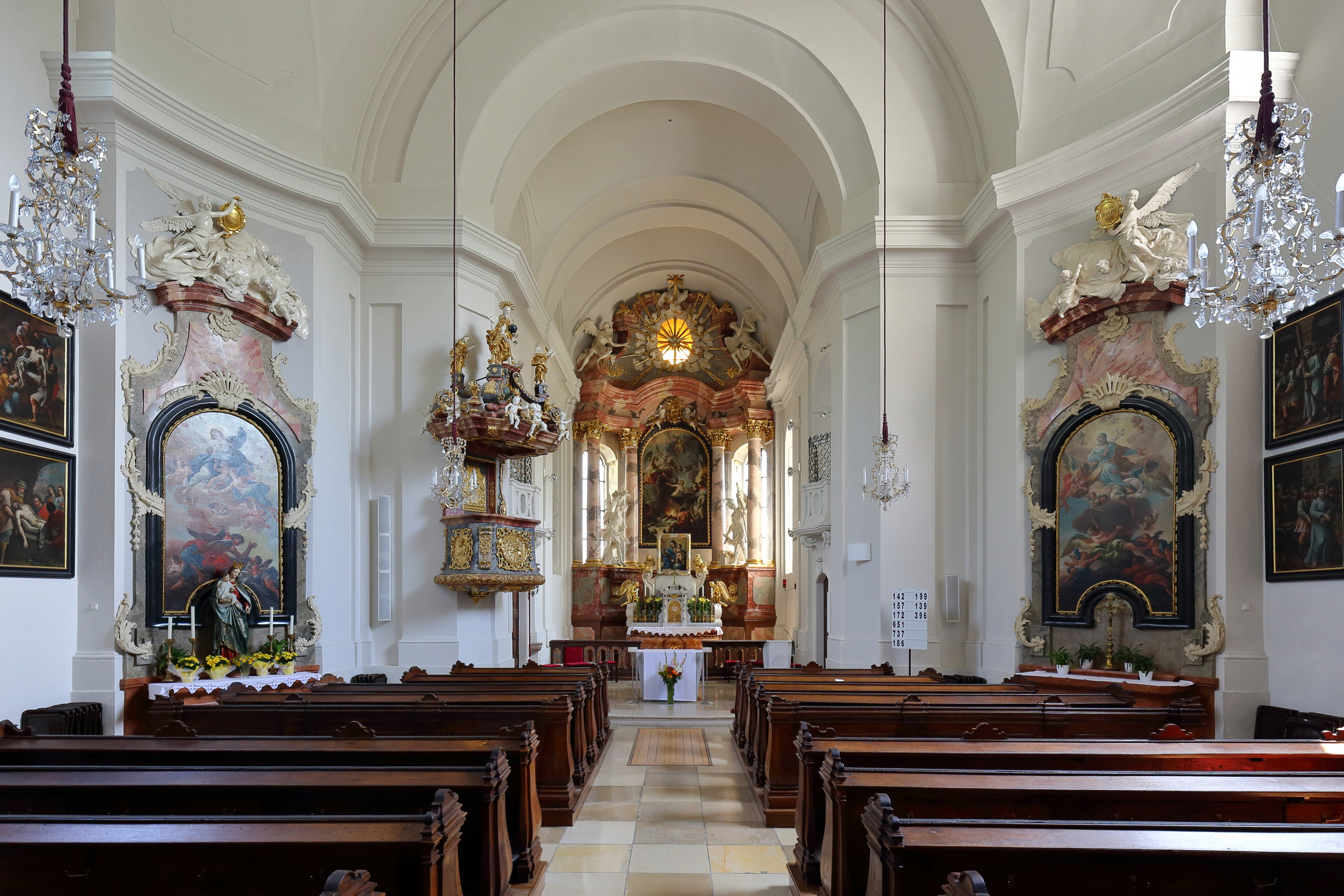 Innenansicht der Ober St. Veiter Pfarrkirche im 13. Wiener Gemeindebezirk Hietzing.Unter Einbeziehung des Altarraumes der Vorgängerkirche erfolgte 1745 ein barocker Neubau nach Plänen von Matthias Gerl. Das Hochaltarbild stellt das Martyrium des hl. Vitus dar und wurde 1745 von Franz Anton Tschungko gemalt. Die Seitenaltarbilder (Marienaltar links und Josefsaltar rechts) sind Werke von Gaetano de Rosa (1690-1770) aus dem Jahr 1744. Die Kanzel aus marmoriertem Holz ist reich verziert und stamm aus der Mitte des 18. Jahrhunderts. Die Kreuzwegbilder hat ein unbekannter Maler um 1730 gemalt.